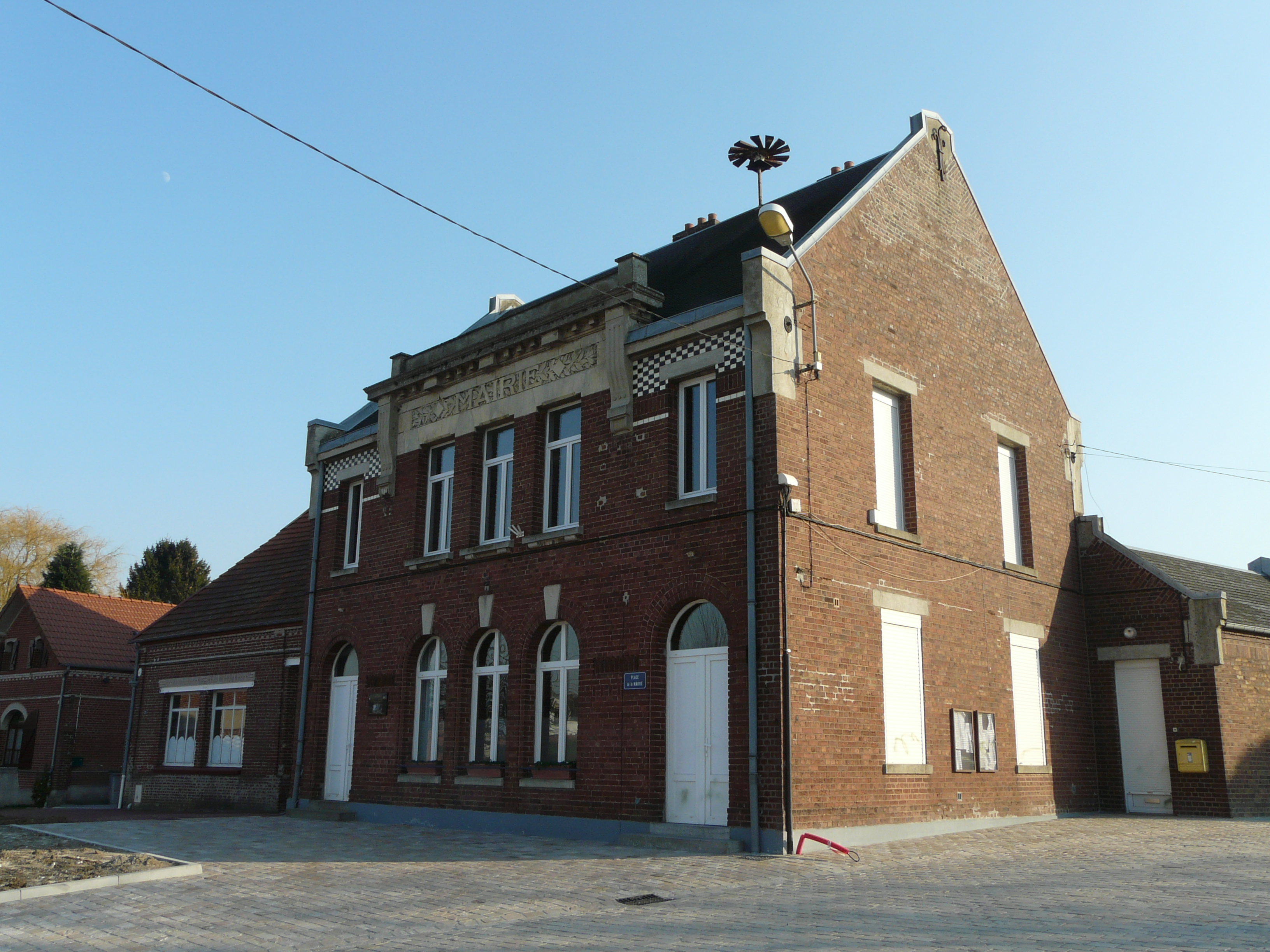 La mairie de Cantaing-sur-Escaut